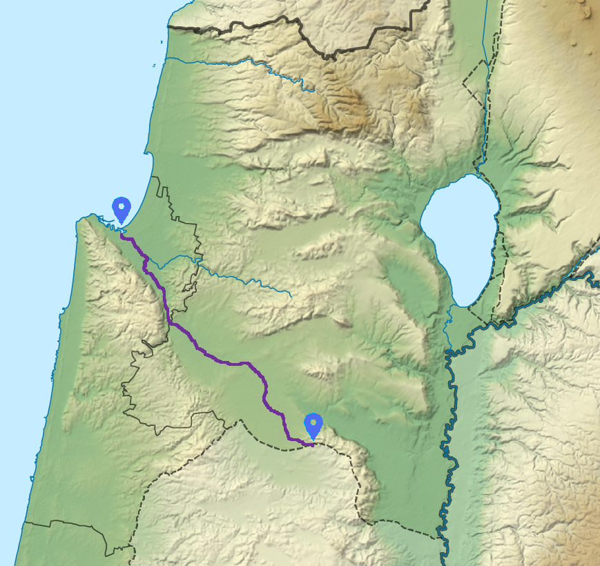 תוואי נחל הקישון. מקור: File:Israel North relief location map.png